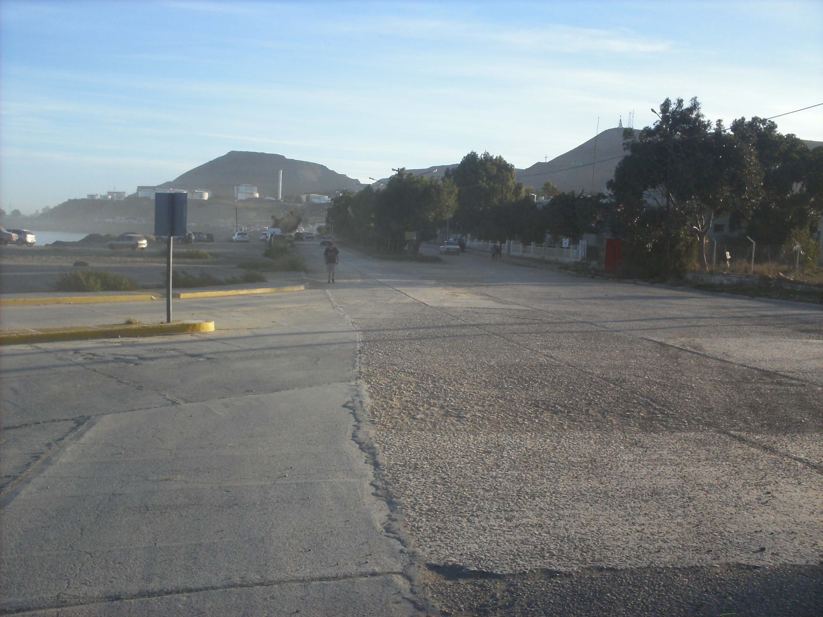 los cerros chenq y viteax desde el 3